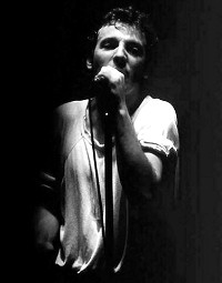 Bruce Springsteen, Drammenshallen, Norway